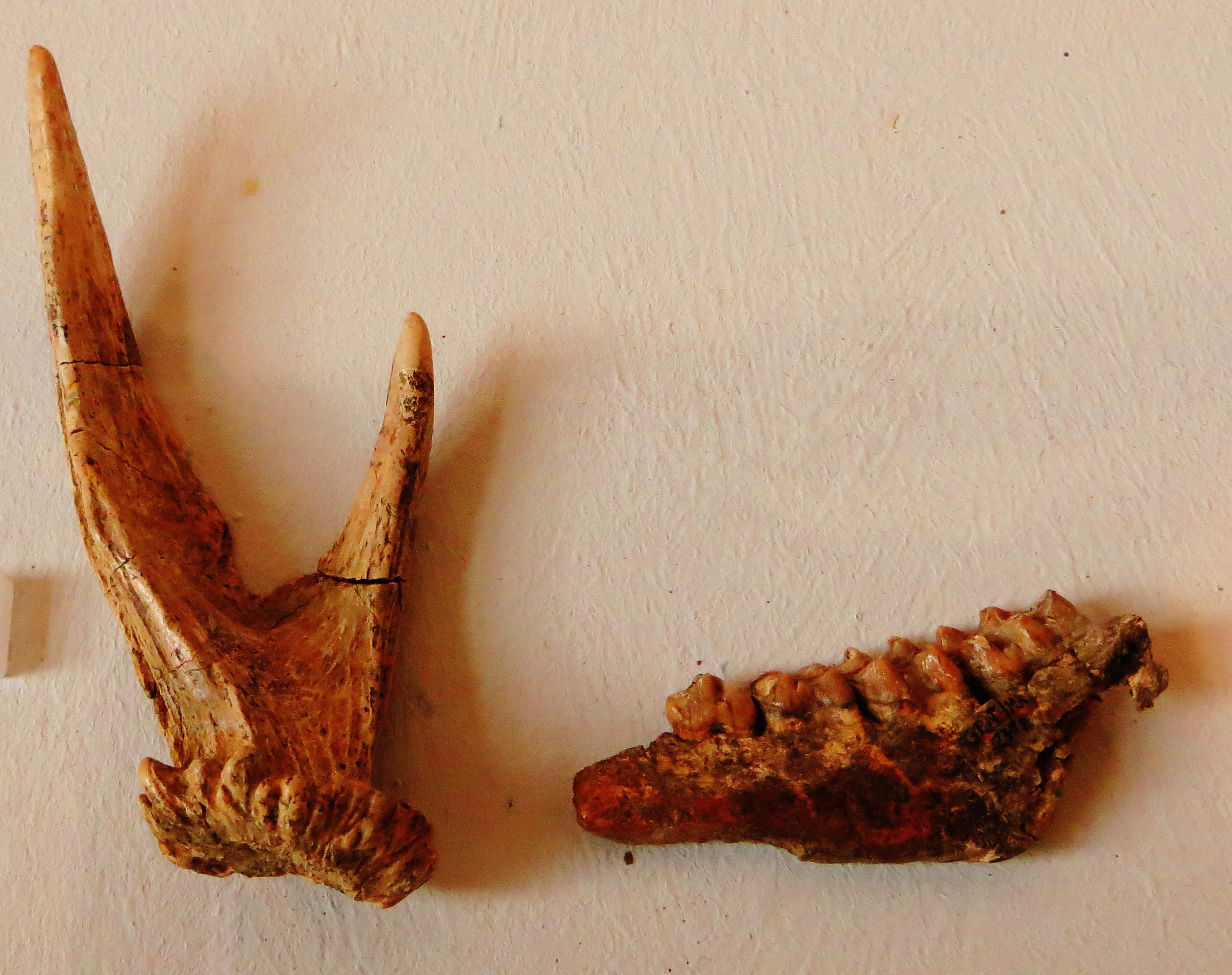 Fossil of Euprox, an extinct mammal- Took the picture at Museum of Paleontology, Tuebingen